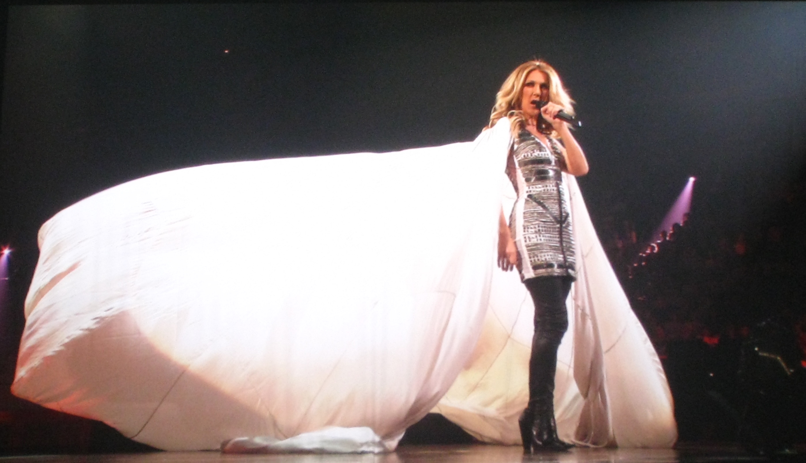 La cantante Céline Dion presentandose en consierto en Montreal, Canadá.